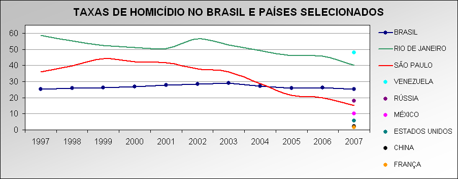 Taxa de homicídios no Brasil e em países selecionados. Murder rates in Brazil and selected countries.